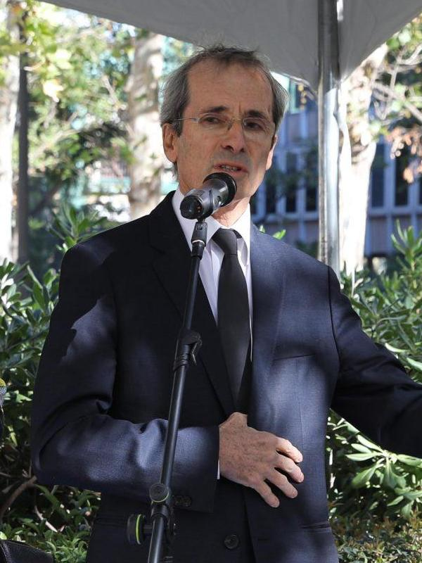 Hace justo dos años que el horror terrorista se cebaba en París con una cadena de atentados que se cobraron la vida de más de 130 personas. Hoy, lunes 13 de noviembre, Madrid y París han vuelto a mostrar su unión en esa lucha contra la barbarie terrorista y su afán por mantener vivo el recuerdo de quienes la han padecido. Manuela Carmena, alcaldesa de Madrid, y el embajador de Francia en España, Yves Saint-Geours, han descubierto un monolito con una placa que, como consta en su texto, busca también que ese recuerdo “nos sirva de estímulo para defender la libertad”. Se cumple así el acuerdo, adoptado por unanimidad del Pleno municipal de noviembre de 2015.